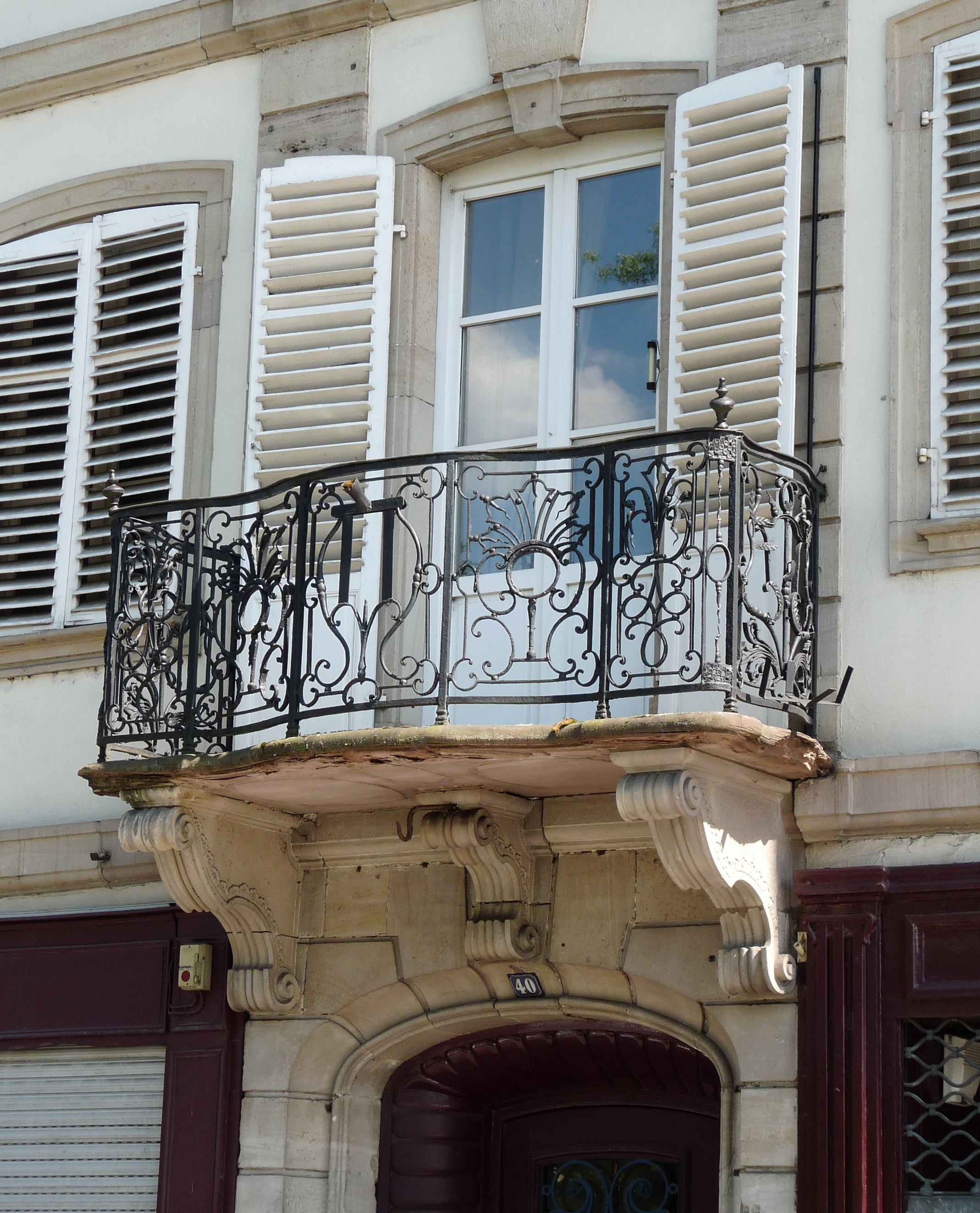 Maison, 40, quai des Bateliers, Strasbourg.